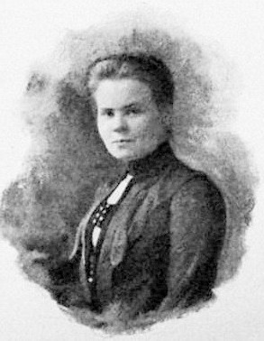 Steinberger Sarolta szülész-nőgyógyász, a budapesti egyetemen végzett első orvosnő.